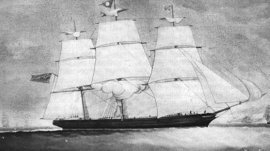 Velero Mimosa hacia los años 1860